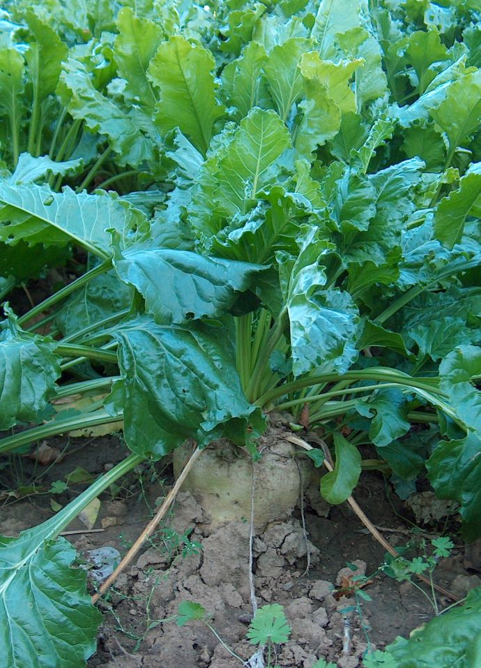 Zückerrübe im Herbst